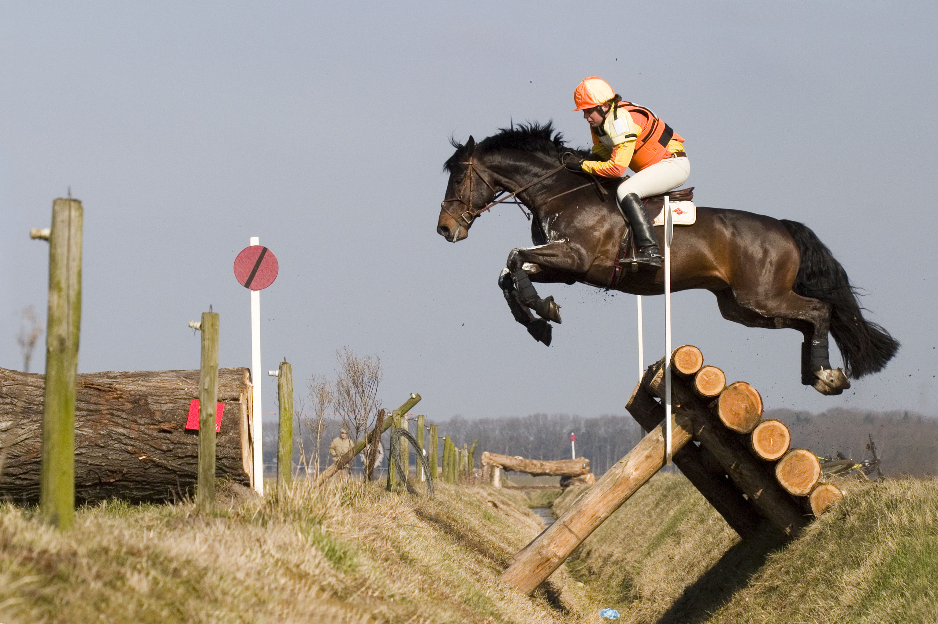 Cross-country tijdens SGW Global-e 't Zand op 18 maart 2006